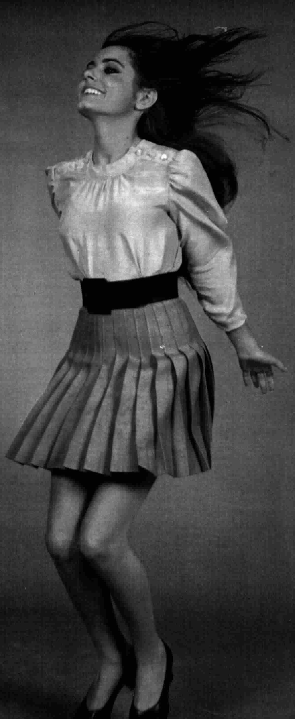 Italian singer Nada